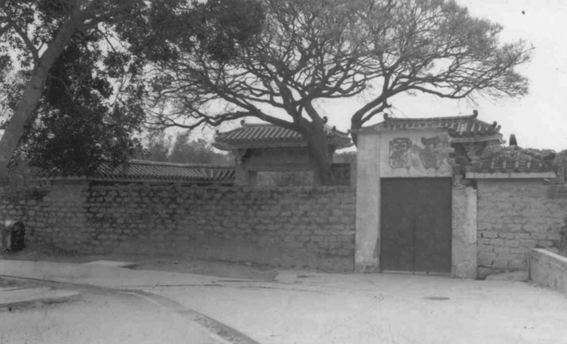 早期西園農莊, 由長洲鄉事委員會提供